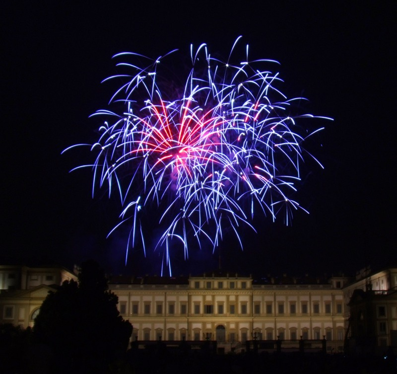 Fuorchi d'artificio a Monza, Lombardia, ItaliaFuochi